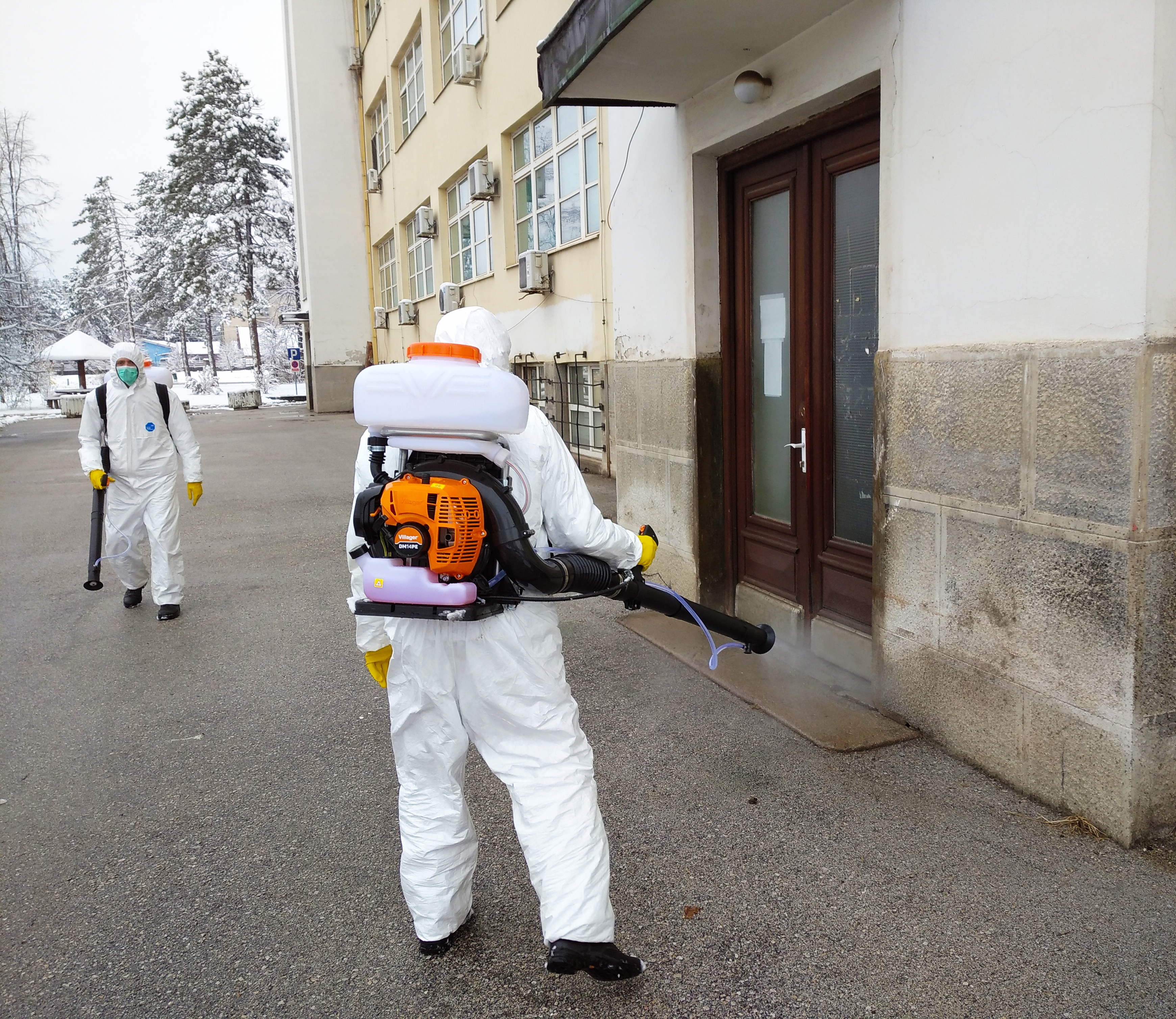 Дезинфекција Ваљевске болнице током епидемије вируса корона 2020 године.